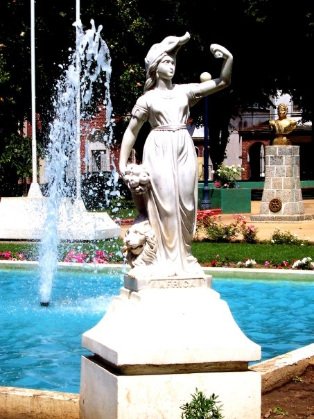 otra version de la plaza de angol